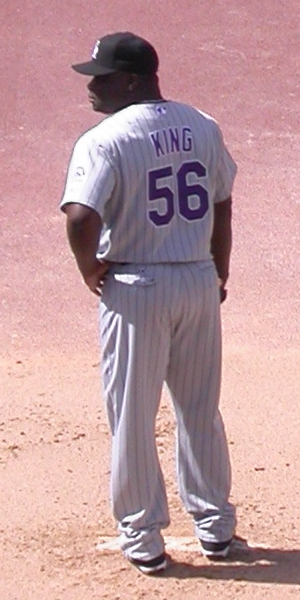 Ray King